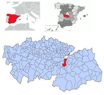 Almonacid de Toledo en la provincia de Toledo